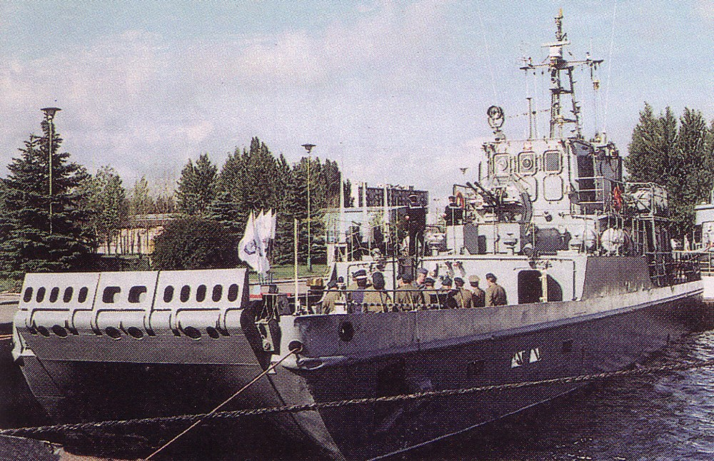 Barka desantowa proj. 716. Zdjęcie wykonane podczas Military Arms 93 w Sopocie